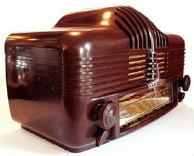 radio antiguo elaborado con baquelita